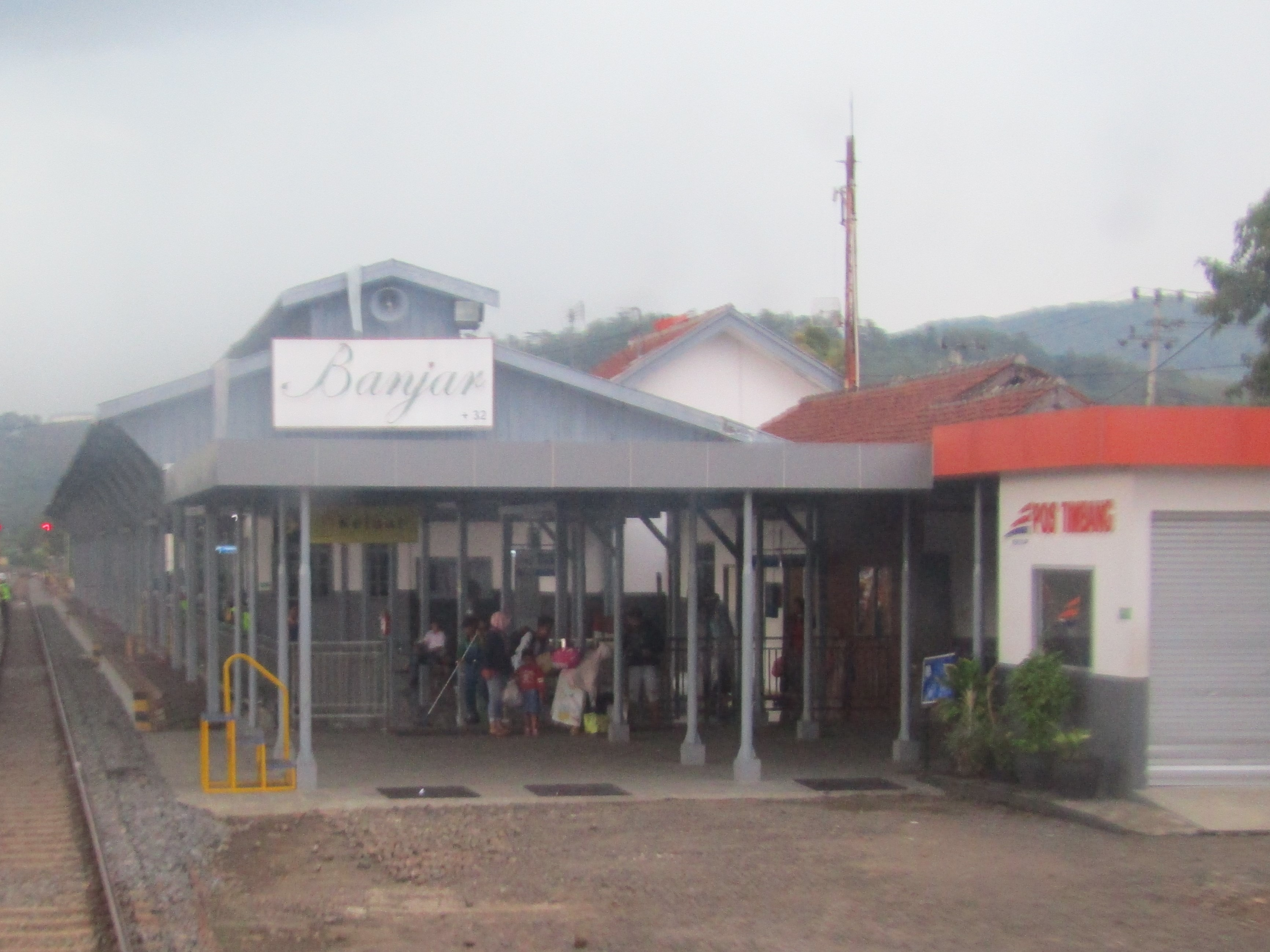 Stasiun Banjar, 2020